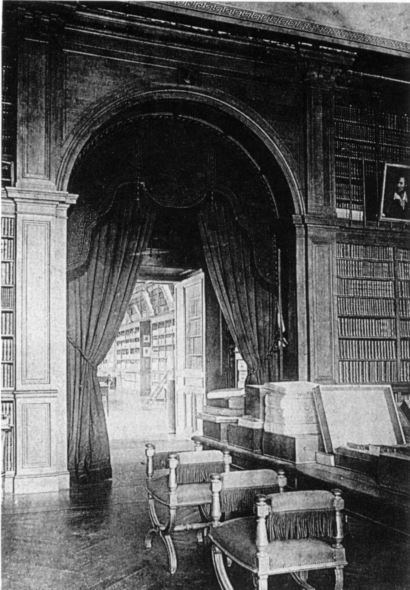 Bibliothèque municipale de Caen, aménagée dans l'ancienne église du séminaire des Eudistes de Caen.